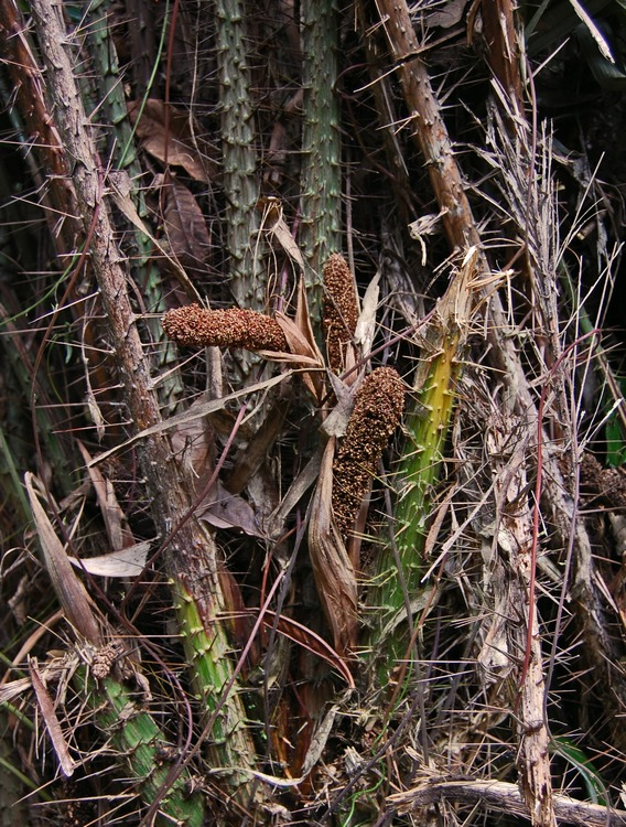 Salacca zalacca, male inflorescence. Darmaga, Bogor, West Java, Indonesia